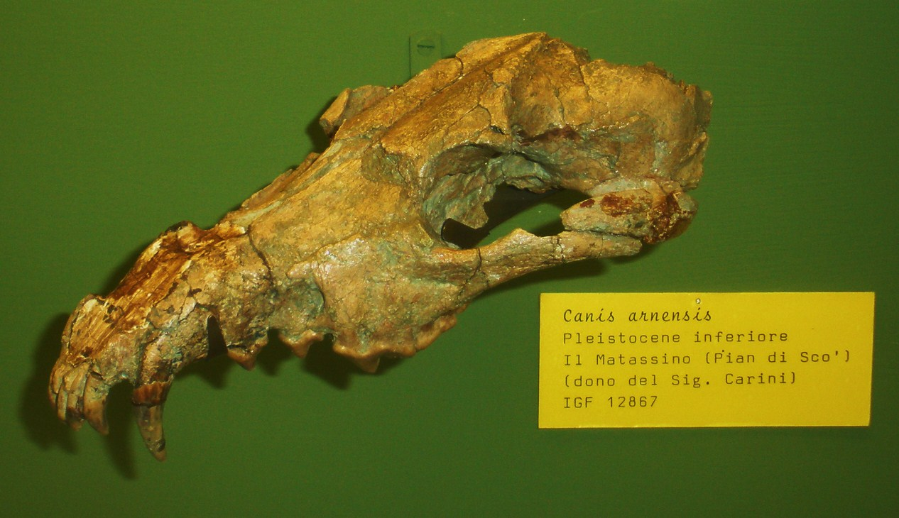 Fossil of Canis arnensis, an extinct mammal - Took the picture at Museo di Paleontologia di Firenze